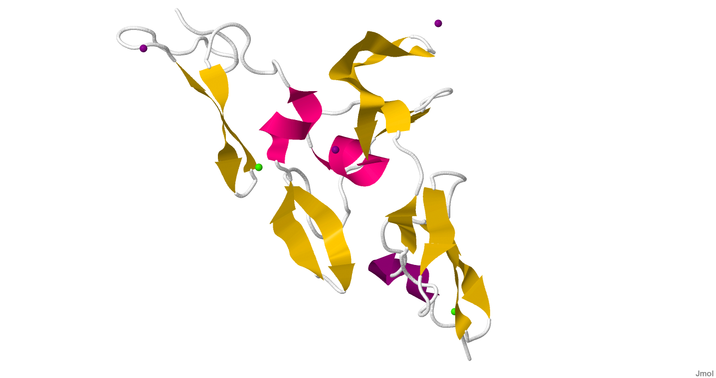 Fibrillin-1